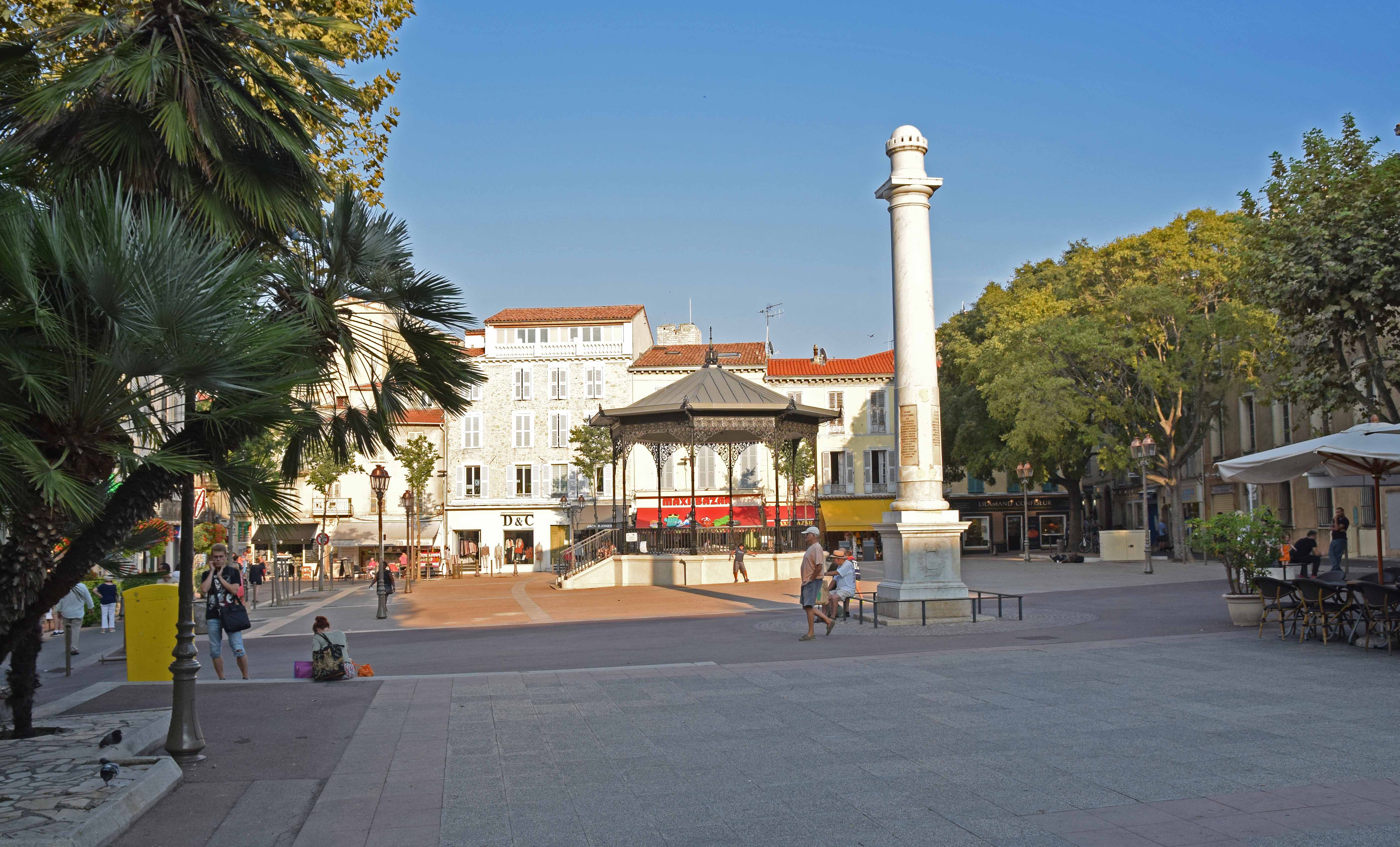 Place Nationale, Antibes